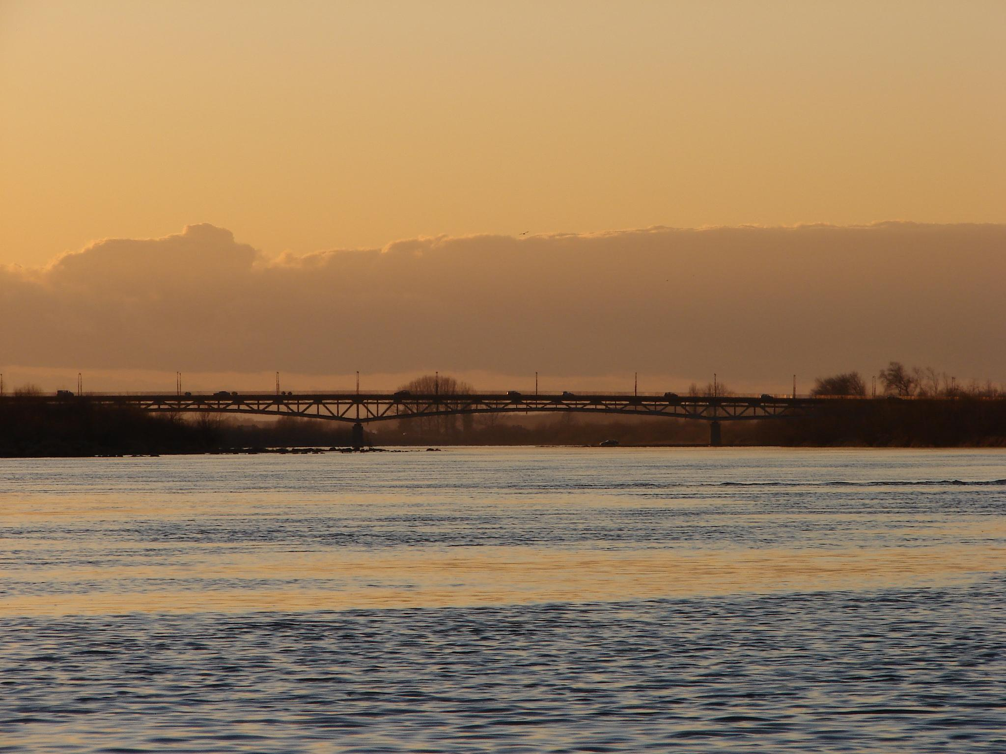 Sandomierz